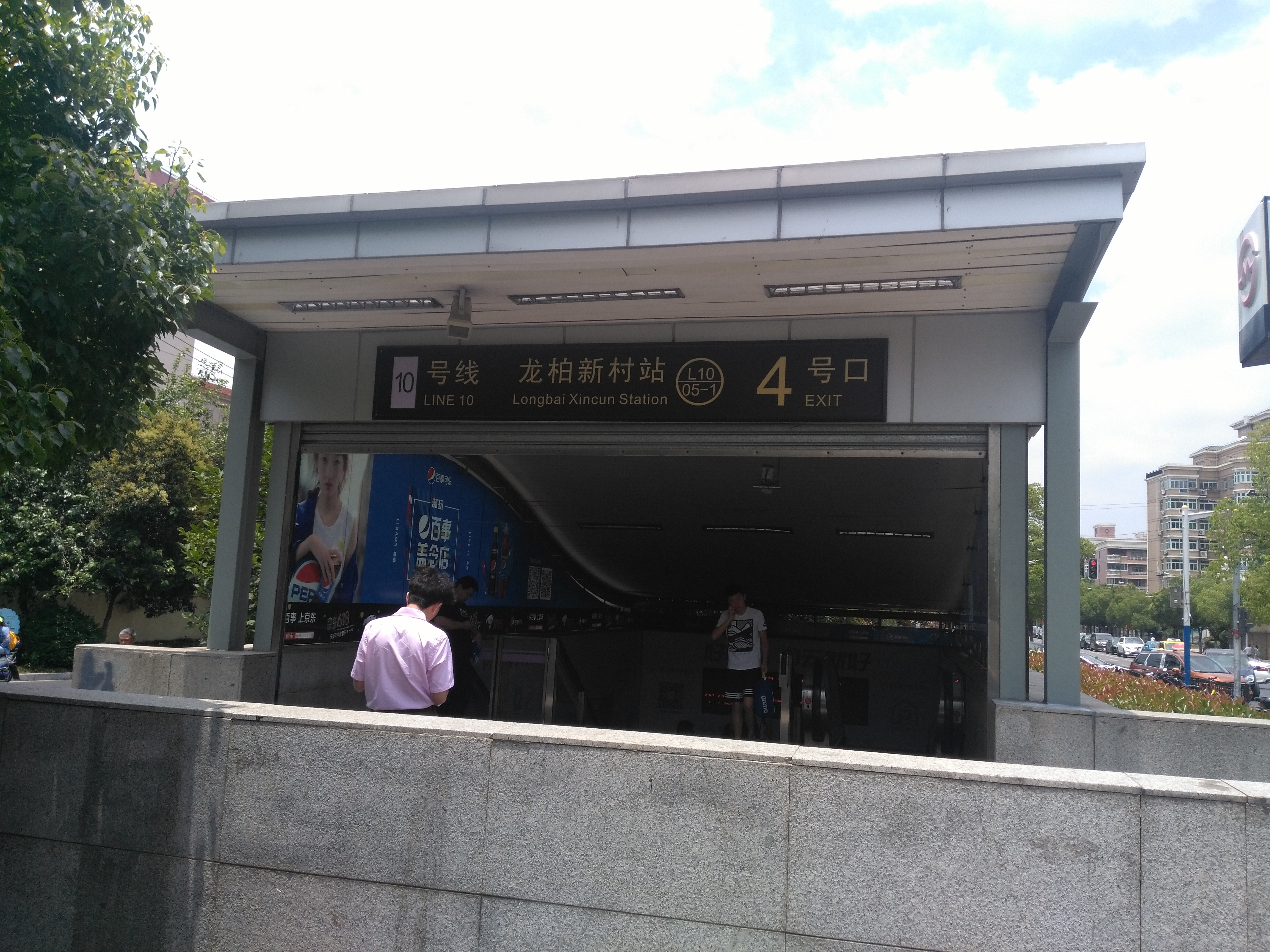 龙柏新村站4号出入口